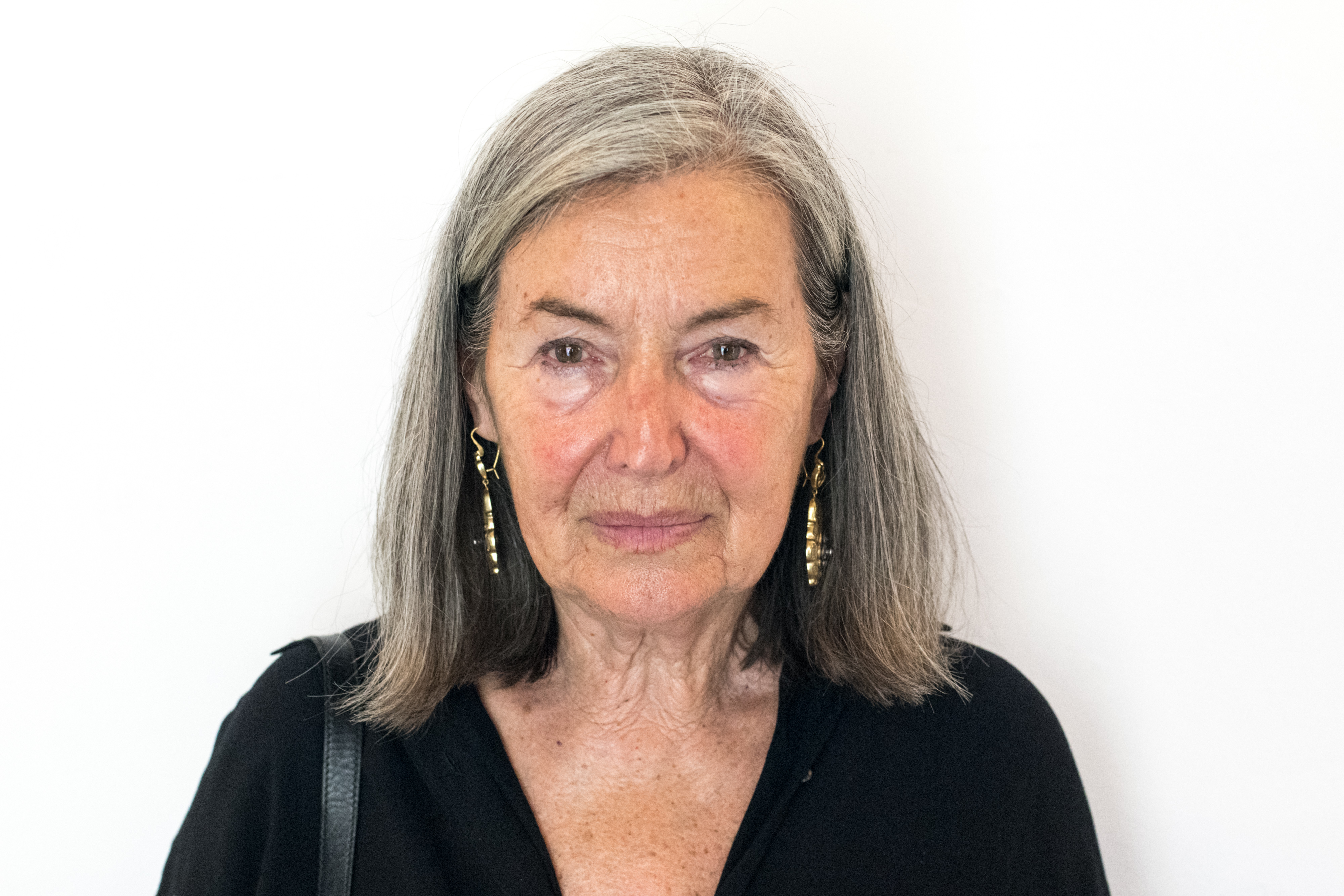 Elfie Semotan bei Crossing Europe